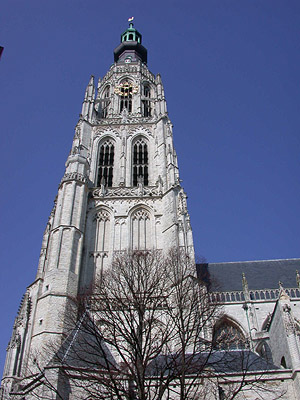 Grote of Onze-Lieve-Vrouwekerk is het belangrijkste monument van Breda.